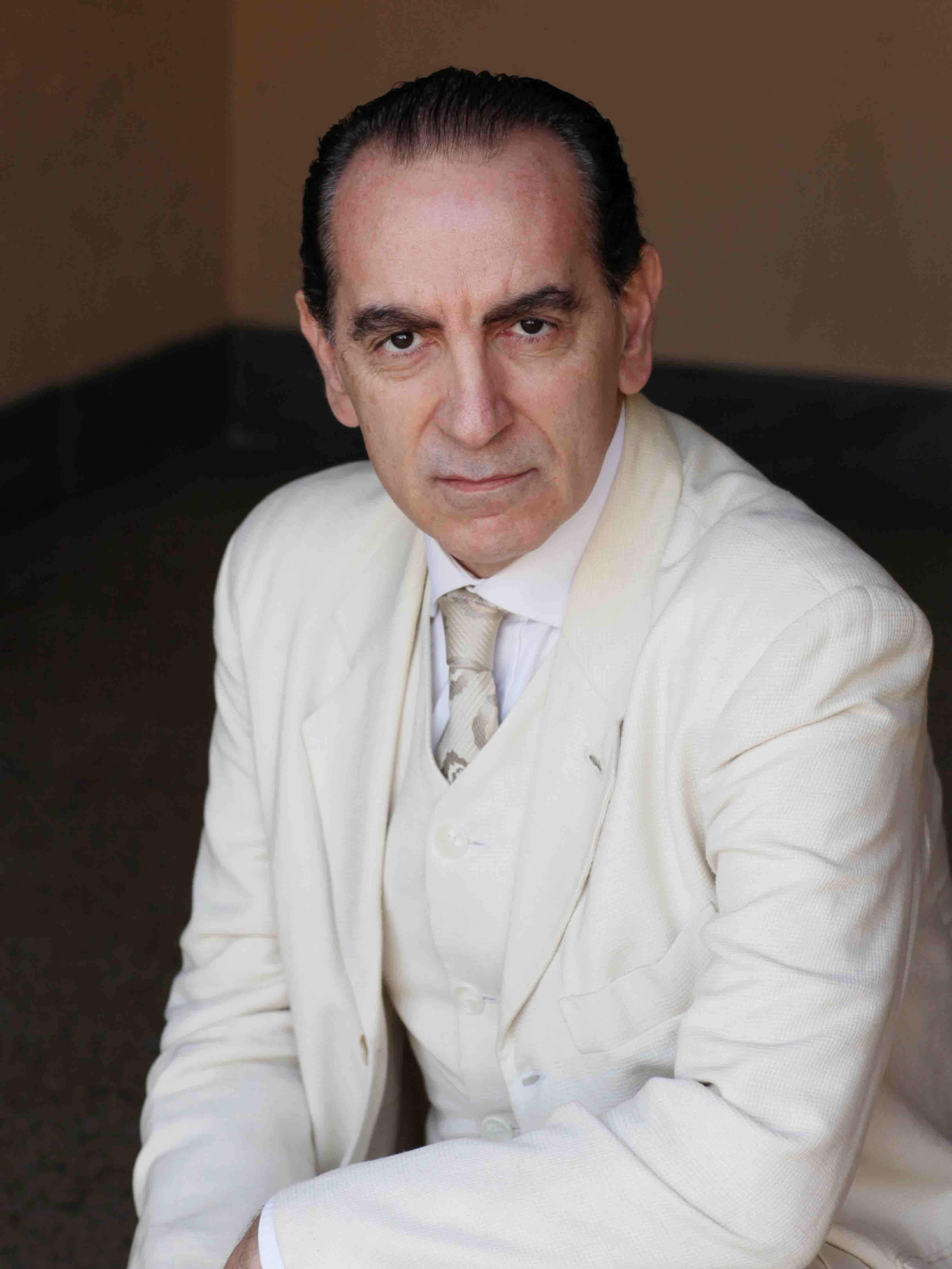 Ritratto dell'artista Gennaro Cannavacciuolo, Roma